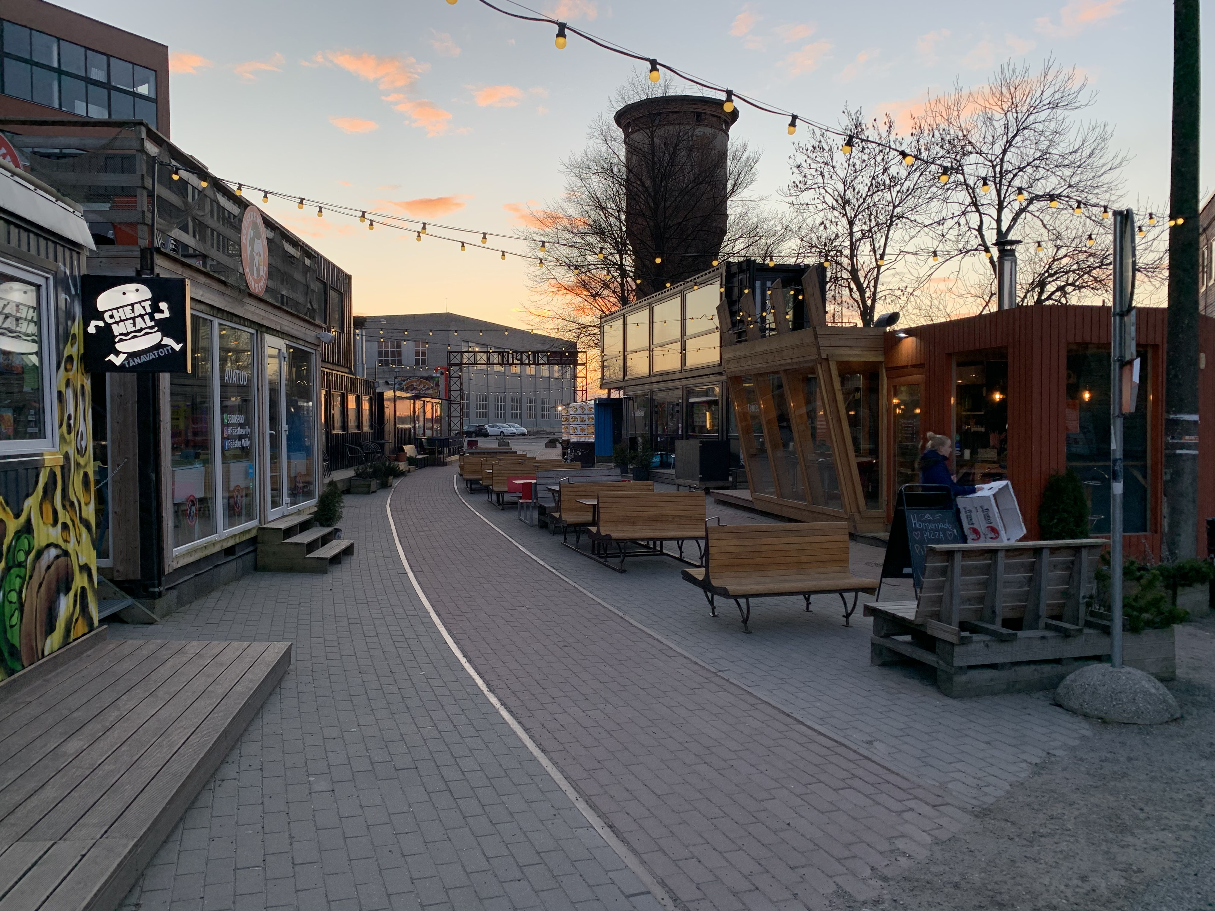 DEPOO toidutänav